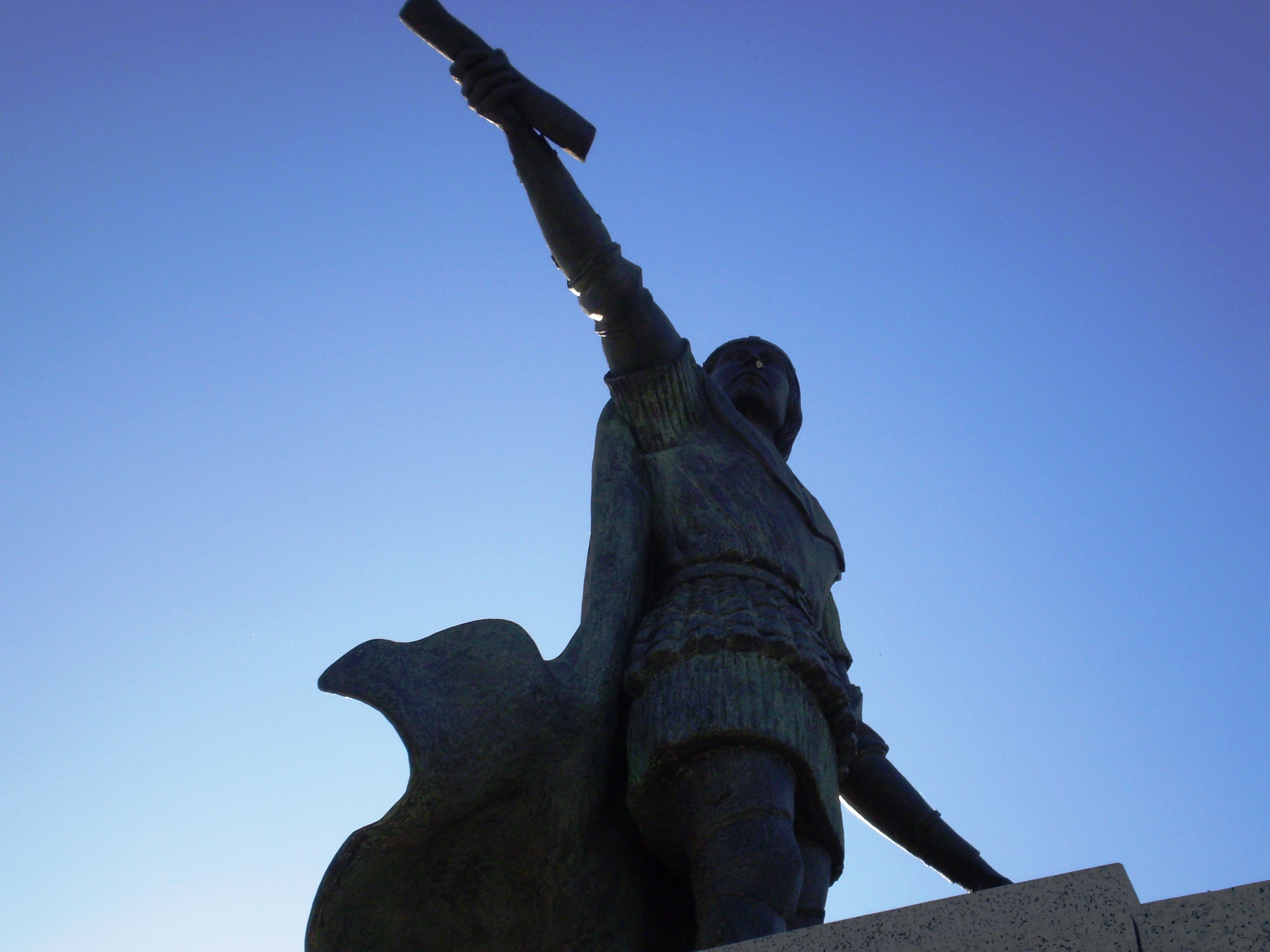 Gonzalo Chacón, promotor del Torreón de Arroyomolinos, Madrid, Spain